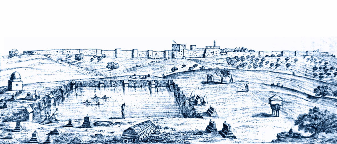 ציור של בריכת ממילא